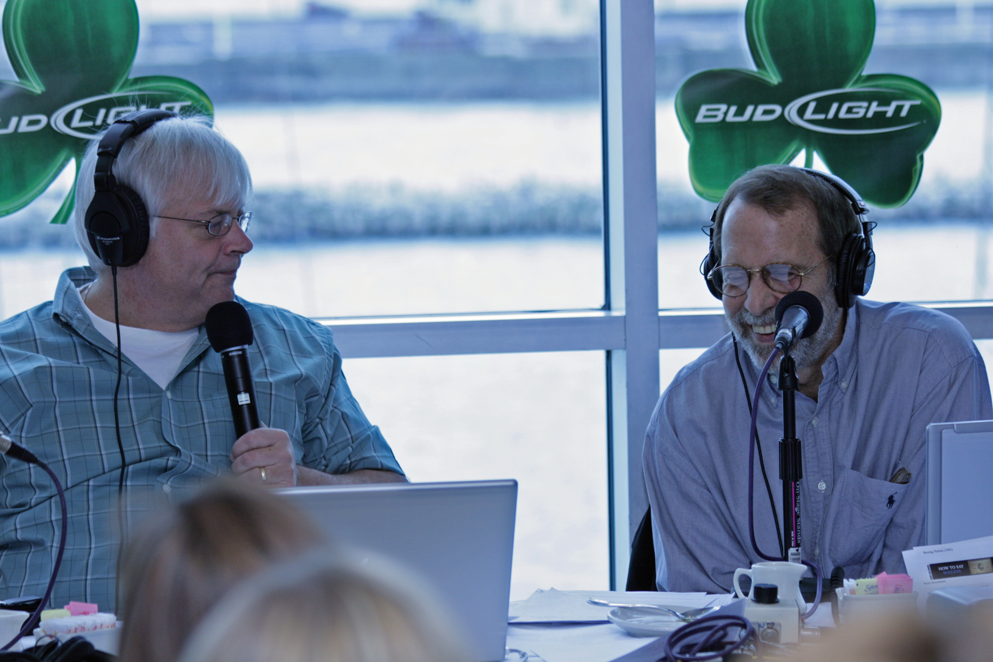 Steve Dahl & Buzz Kilman